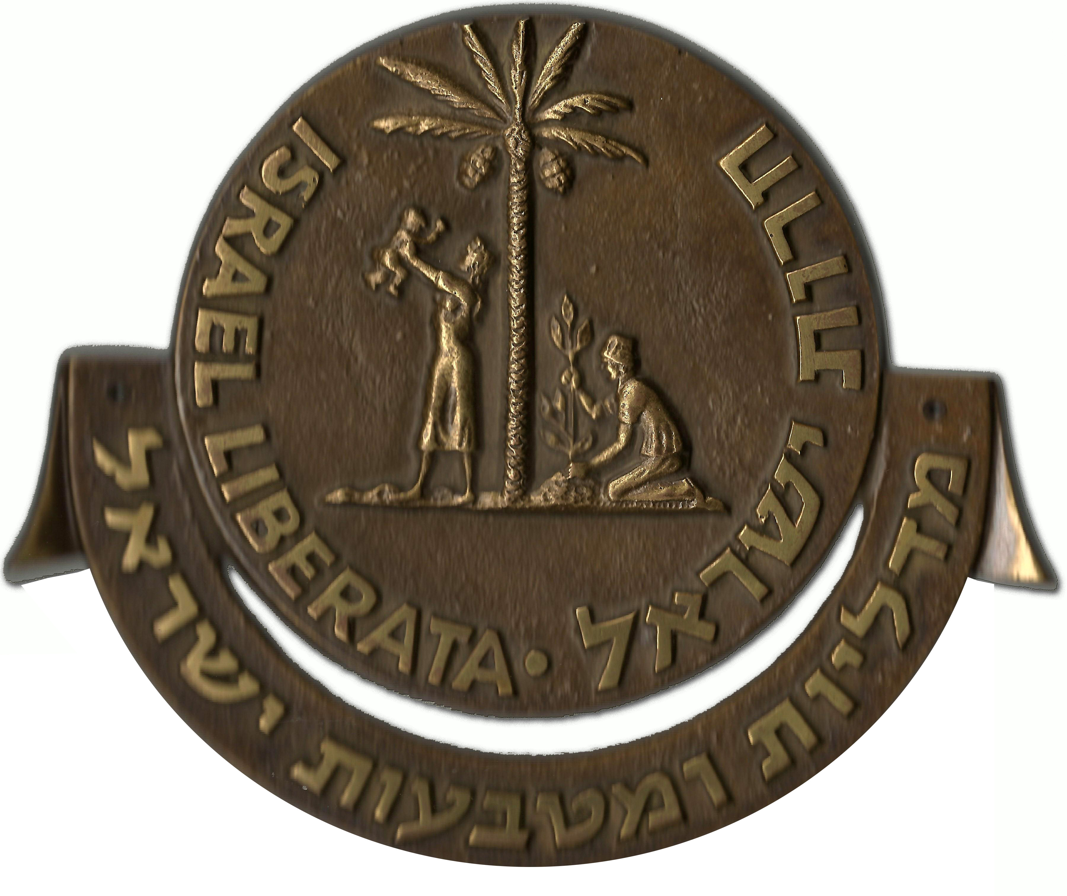 משרד ראש הממשלה - יחידת מדליונים ומטבעות - סמל היחידה